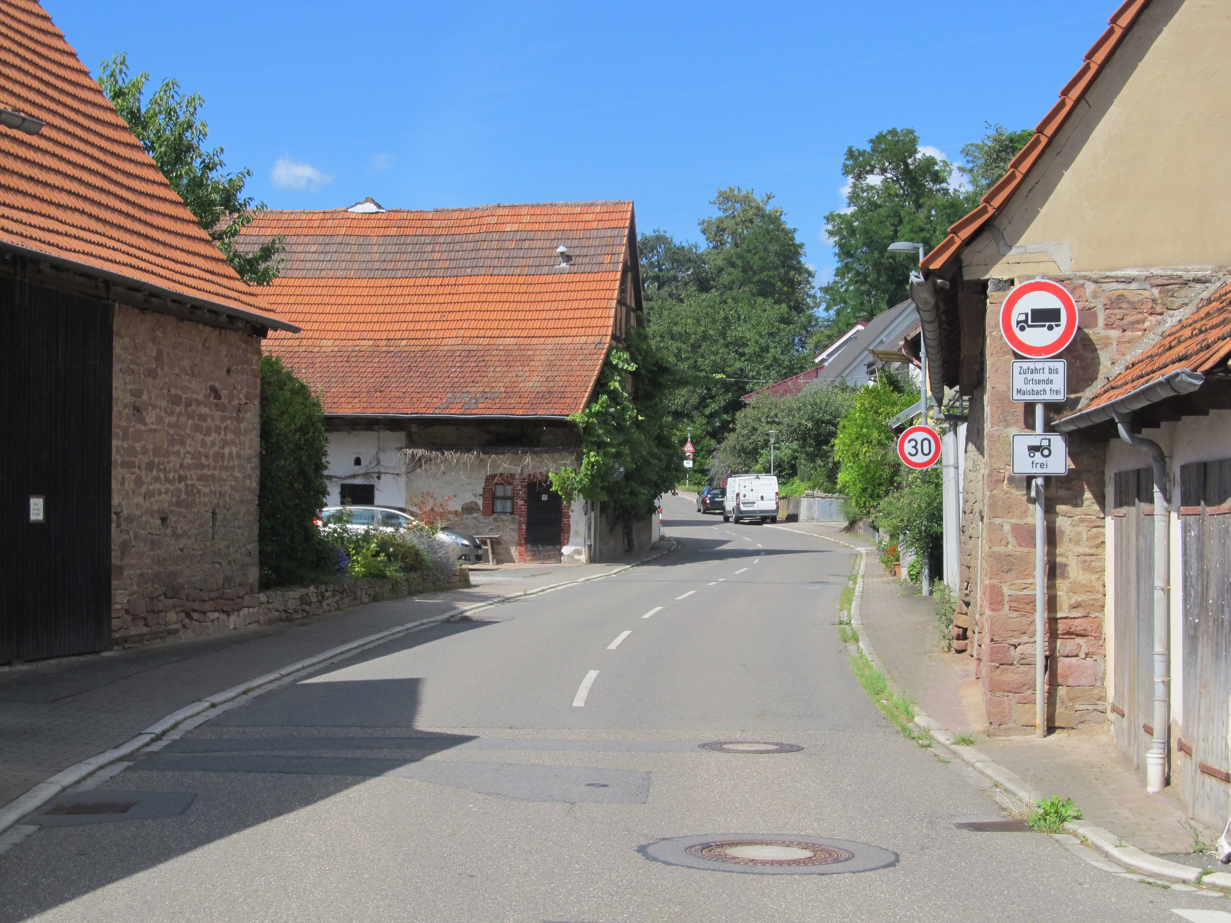 Maisbach Ortsmitte, Blick nach Osten